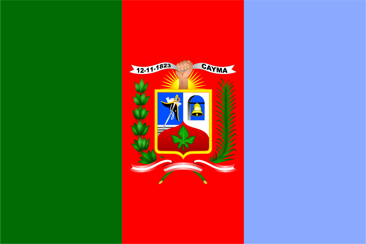 Distrito de Cayma - Provincia de Arequipa - Región Arequipa